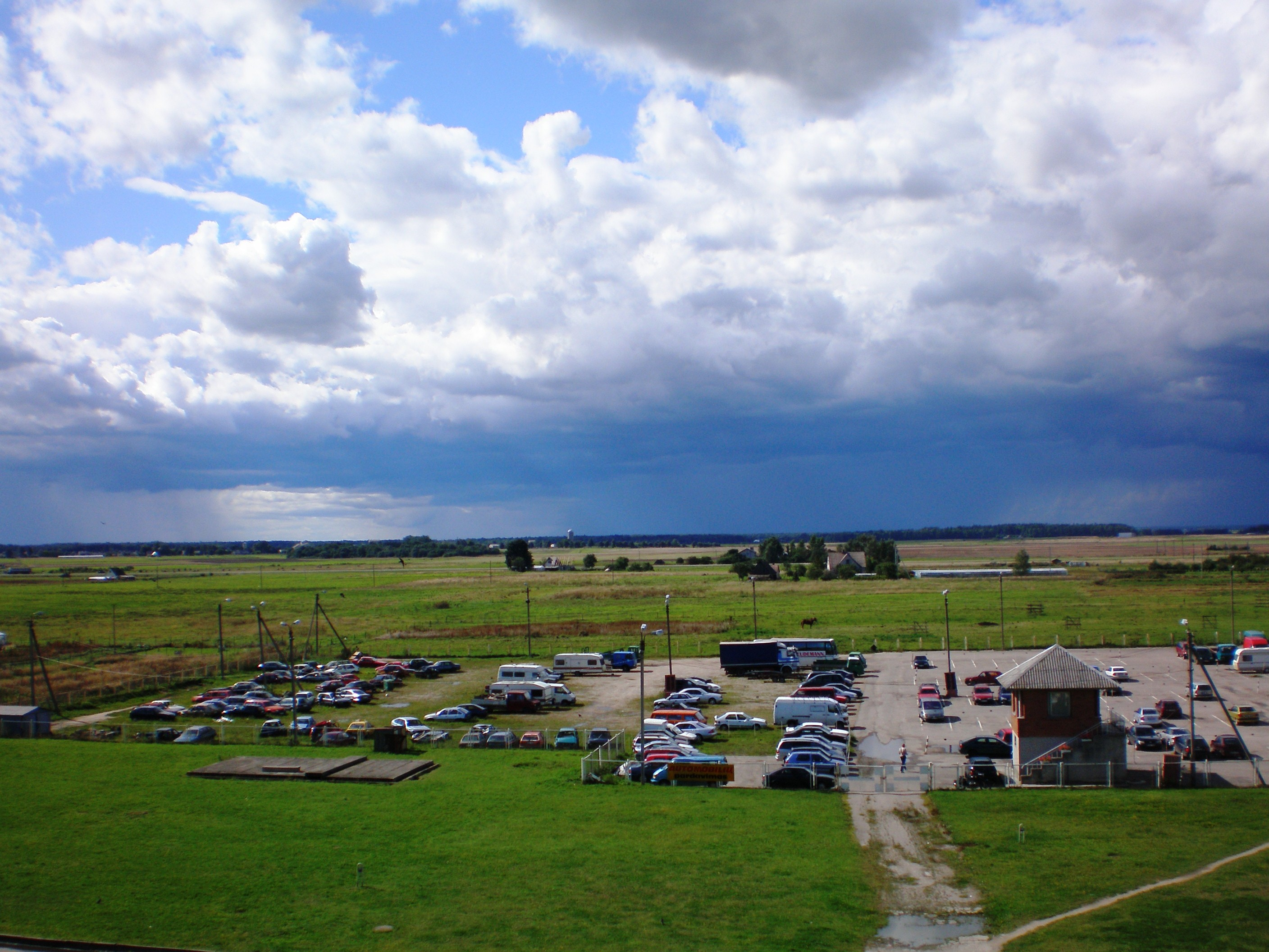 Llanura de Nevėžis en Lituania Central